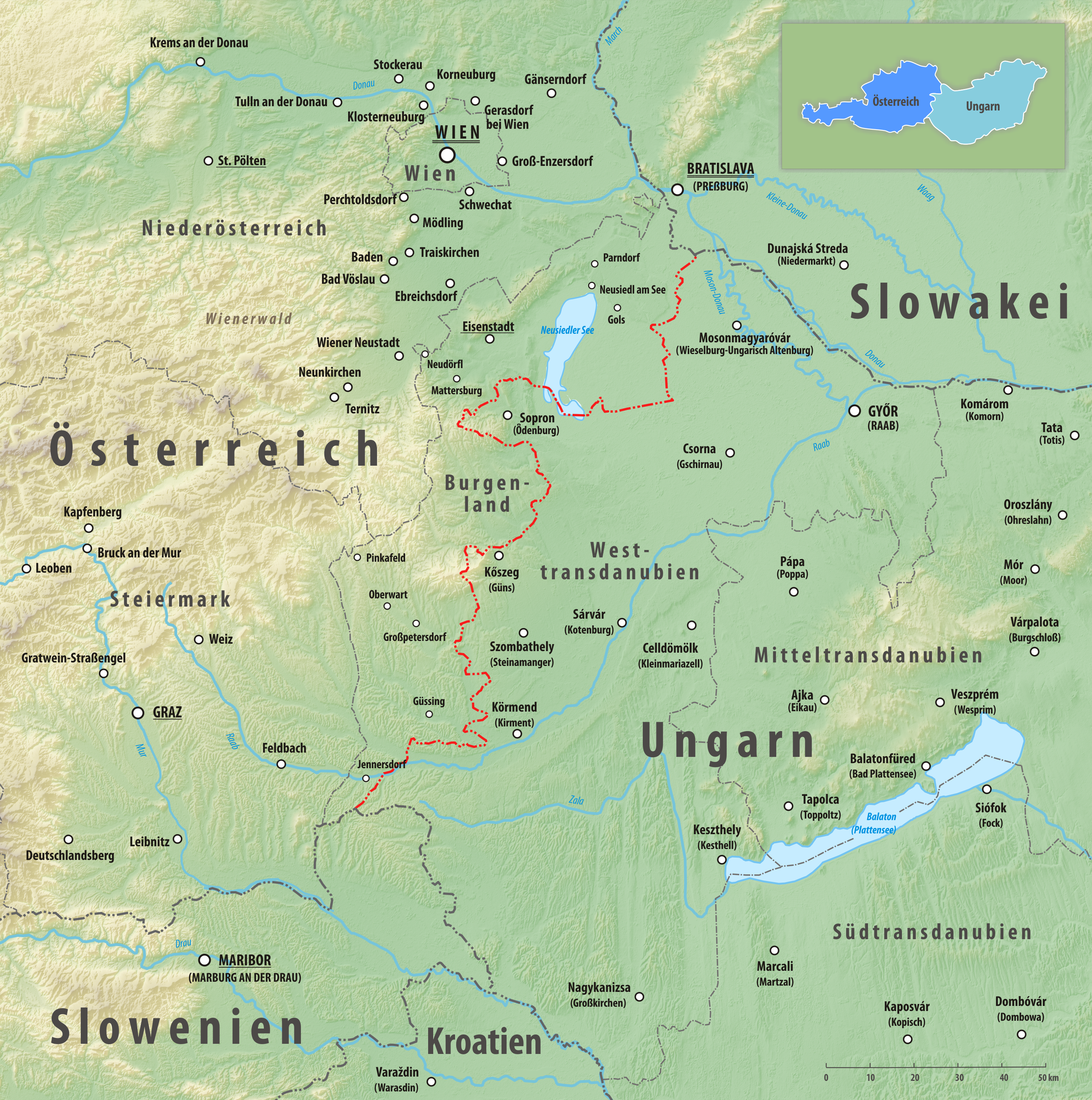 Reliefkarte des Grenzverlaufes zwischen Österreich und Ungarn Topographischer Hintergrund: NASA Shuttle Radar Topography Mission (public domain). SRTM3 v.2.